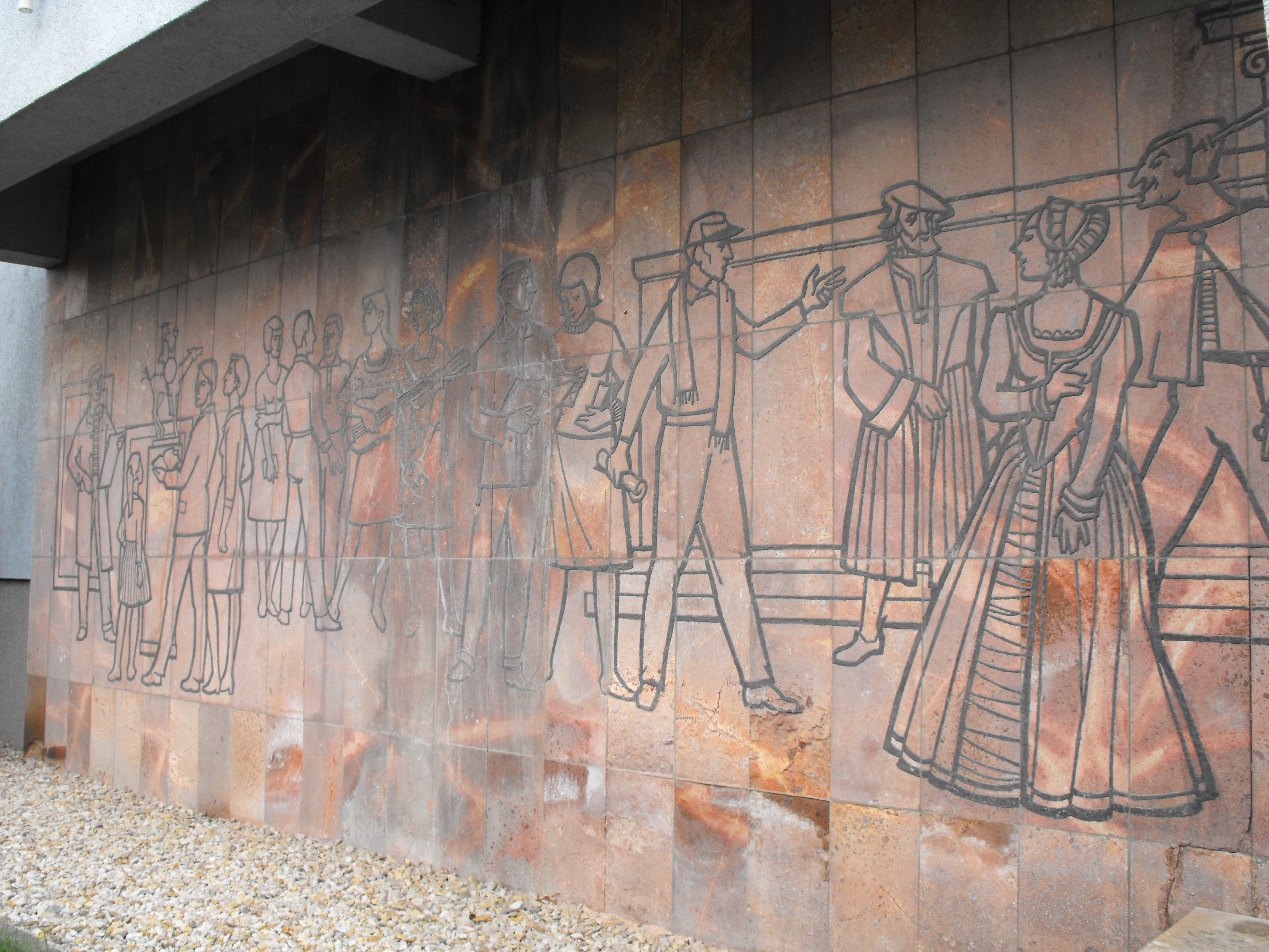 Bleiintarsien in der Chemnitzer Brückenstrasse in Zusammenarbeit von Johannes Belz, Robert Diedrichs, Rudolf Fleischer und Rudolf Kraus Entwurf: Rudolf Fleischer